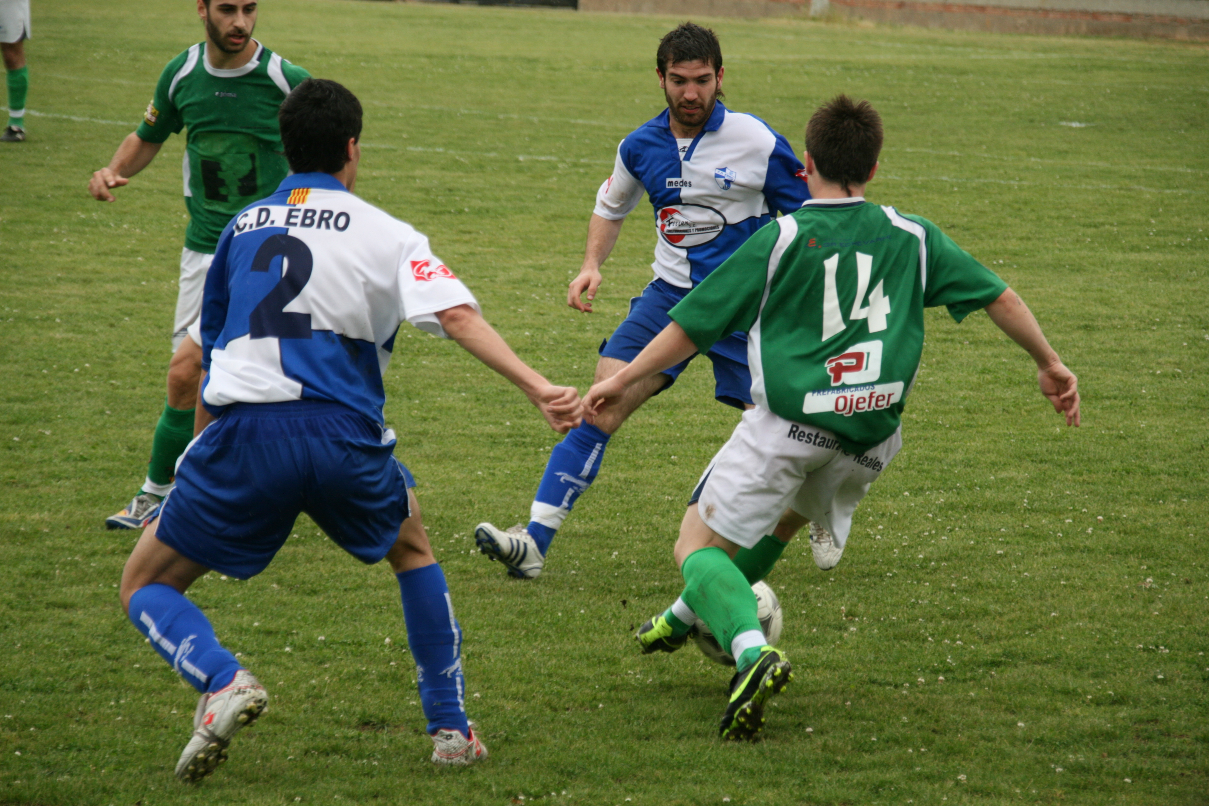 Altorricón-CD Ebro